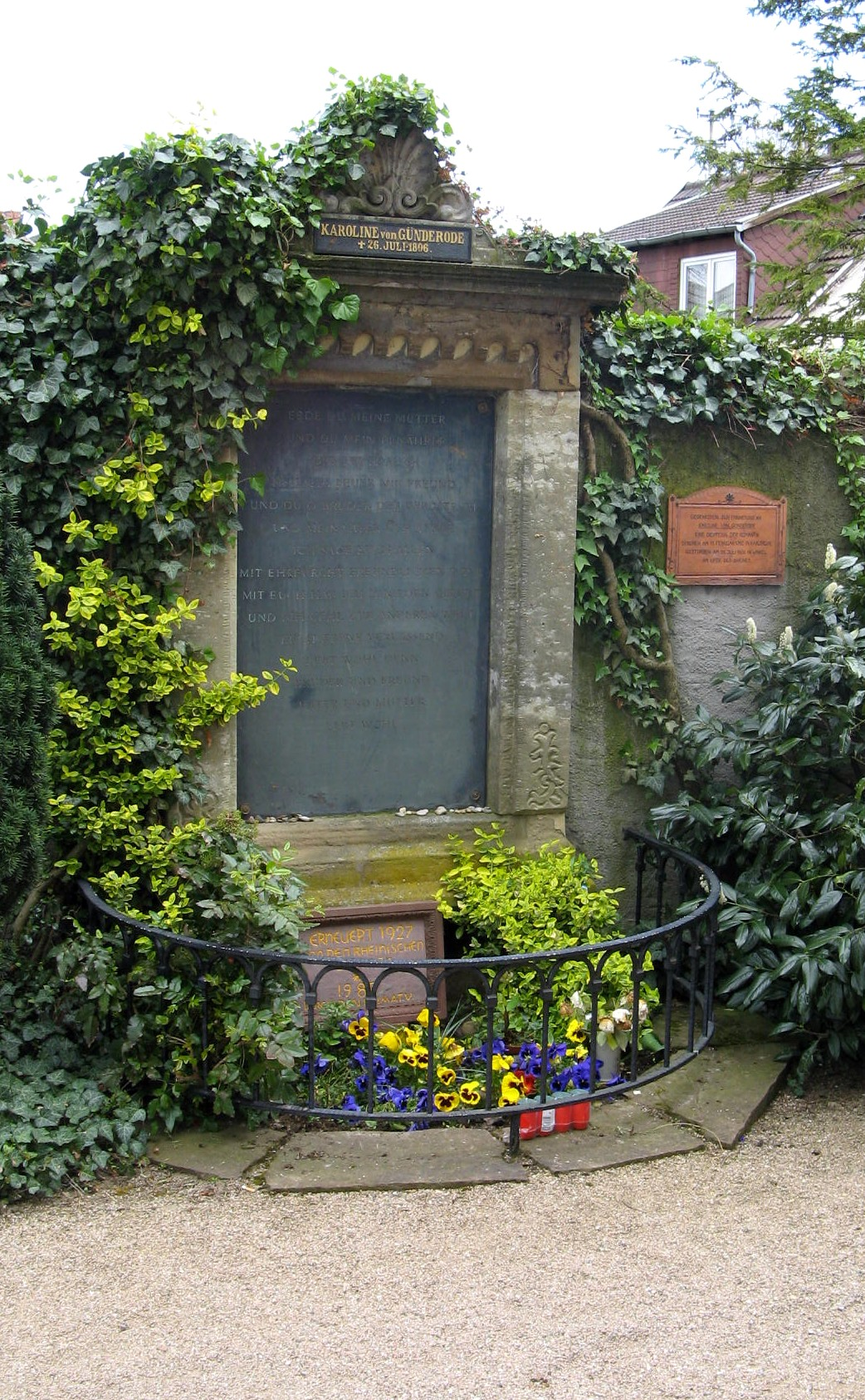 Grab der Karoline von Günderrode in Oestrich-Winkel